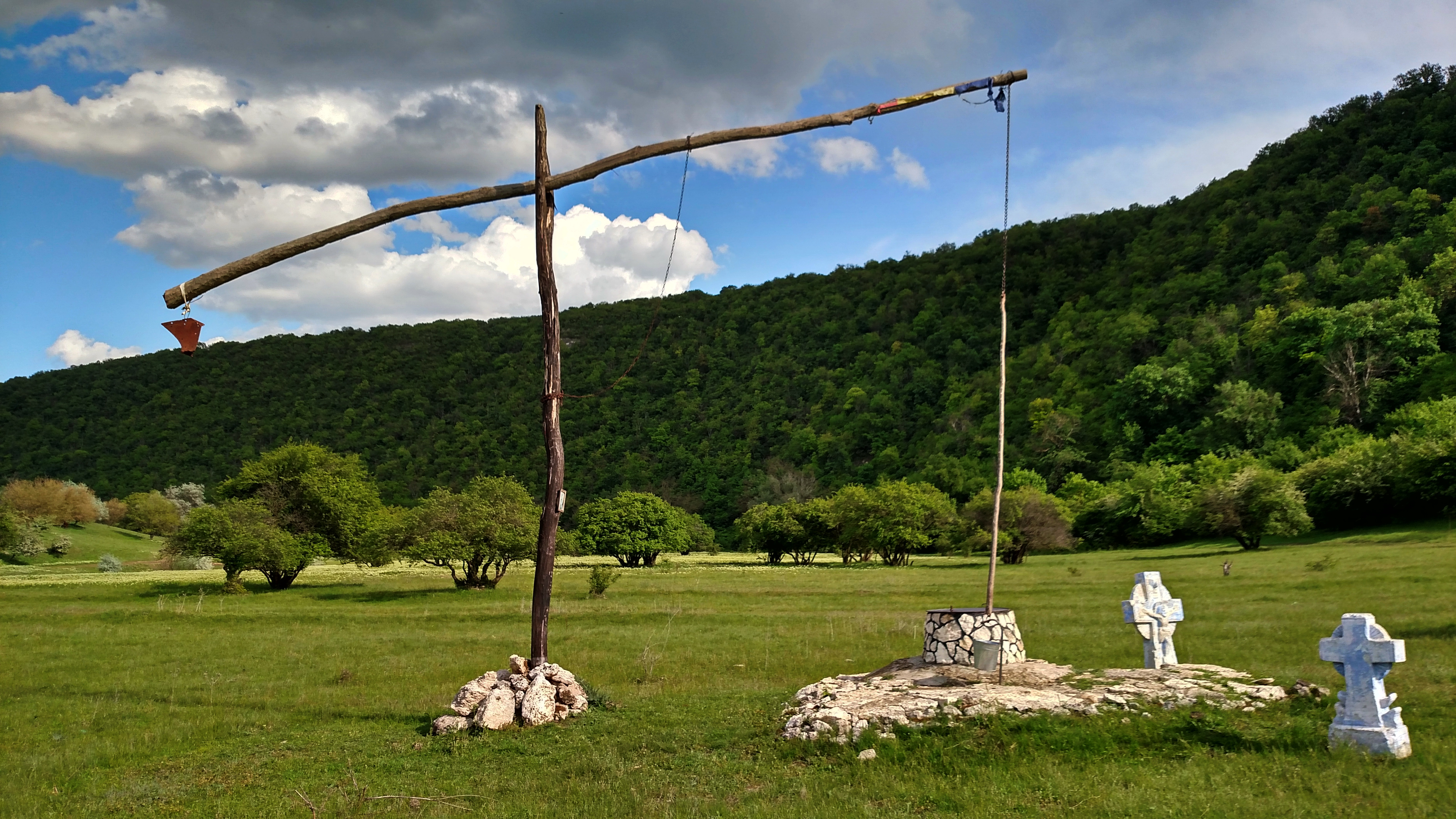 Trebujeni, monument al naturii amplasat în raionul Orhei, între satele Furceni și Trebujeni, ocolul silvic Susleni, Jeloboc-Furceni, parcelele 51, 52; ocolul silvic Ivancea, Trebujeni, parcelele 31, 32, 34, 35, 37 (cod MD-OR-rp-030)